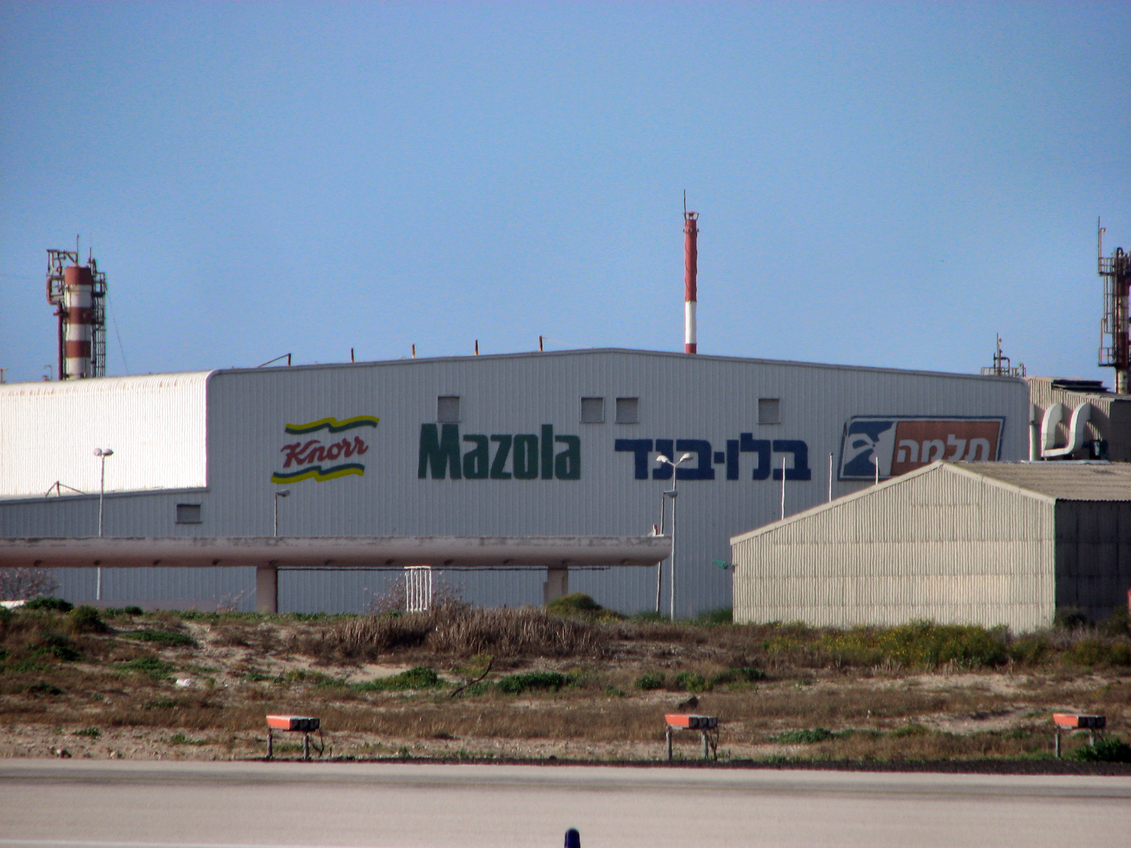 מפעל תוצרת מזון ישראלית במפרץ חיפה